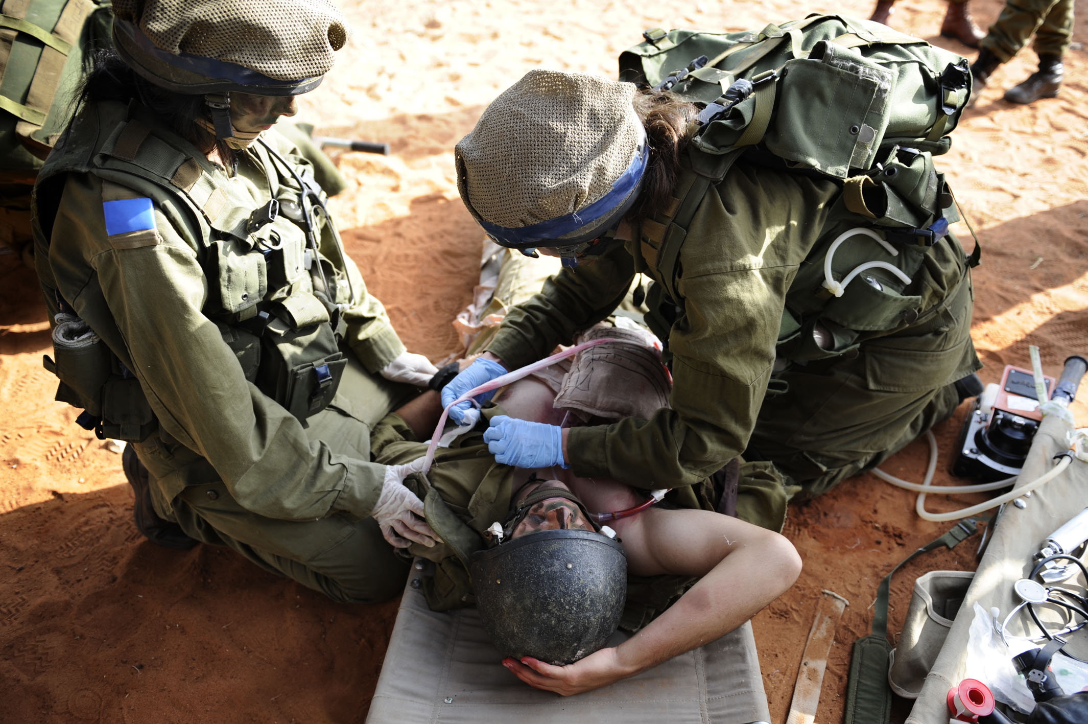 October 27, 2010. The Medical Corps concludes a final test for the largest course of medical doctors to ever graduate in IDF history. Approximately 50 newly-appointed doctors will be finishing the course next week and getting their placement throughout the various IDF units in the sea, land, and air. This marks the IDF's final step in filling the noticeable lack of doctors in the army, and from now on there will be a doctor in every battalion. The Commander of the Medical Corps, Brig. Gen. Dr. Nachman Ash, tested the IDF doctors-to-be and congratulated the participants: “These are doctors full of motivation, with a sparkle in their eyes. They are ready and willing to do their work. There is no doubt that from now on, with the manning of the positions in all field units, the medical response for soldiers will correspond to the need.” חיל הרפואה קיים אתמול (ד') תרגיל מסכם לקורס הרופאים הגדול ביותר בתולדות צה"ל. כ50- רופאים חדשים יסיימו בשבוע הבא את קורס הרופאים הצבאי וישובצו ביחידות צה"ל השונות, באוויר,בים וביבשה. צה"ל סוגר את פער הרופאים הגדול שהורגש בגדודים, ומעכשיו יהיה רופא לכל גדוד בצה"ל. קצין הרפואה הראשי, תא"ל ד"ר נחמן אש, בחן את הרופאים לעתיד של צה"ל וברך את המשתתפים: "אלה רופאים מלאי מוטיבציה וברק בעיניים, הם נכונים ורוצים לעשות את עבודתם. אין ספק שמעתה, עם איוש כלל יחידות השדה ברופאים, גם המענה לחיילים יהיה בהתאם".